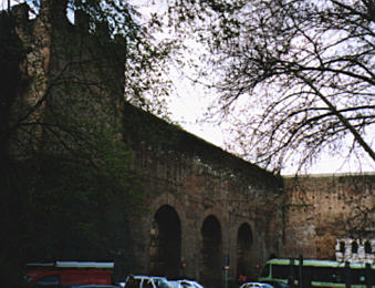 Aurelianische Mauer in Rom. Der fotografierte Teil der Stadtmauer befindet sich in der Nähe der Porta Maggiore. Gut ist einer der 383 Wehrtürme zu erkennen und die Bögen des ehemaligen Aquäduktes, die hier in die Aurelianische Mauer integriert wurden.